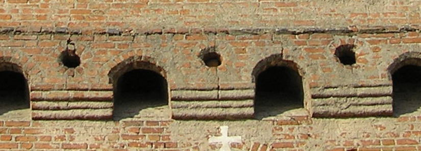 Машыкулі Сынкавіцкай царквы